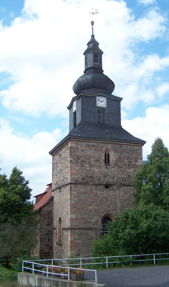 Teilansicht der Peterskirche